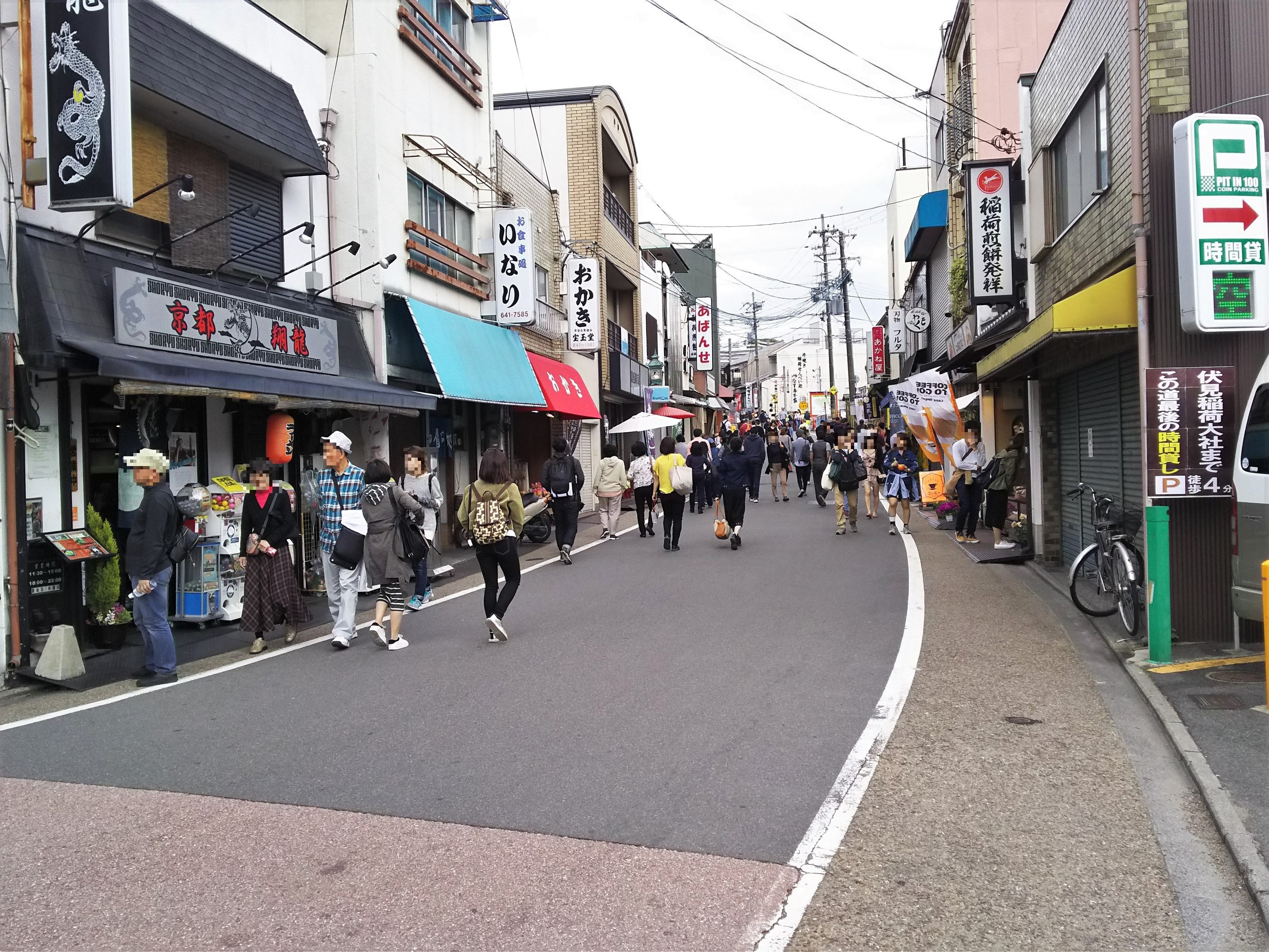 京阪伏見稲荷駅から伏見稲荷大社への道（京都市伏見区）